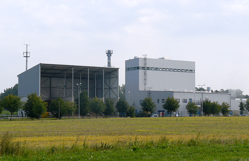 Biomasse-Heizkraftwerk in Sellessen/ Brandenburg/ Deutschland. Betreiber Vattenfall Europe.